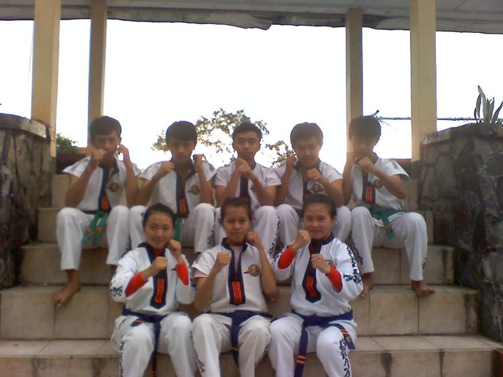 rame-rame